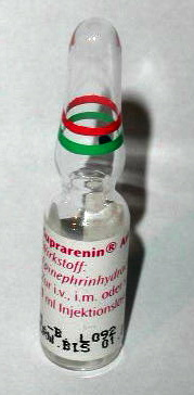 Adrenalin Ampulle 1:1000